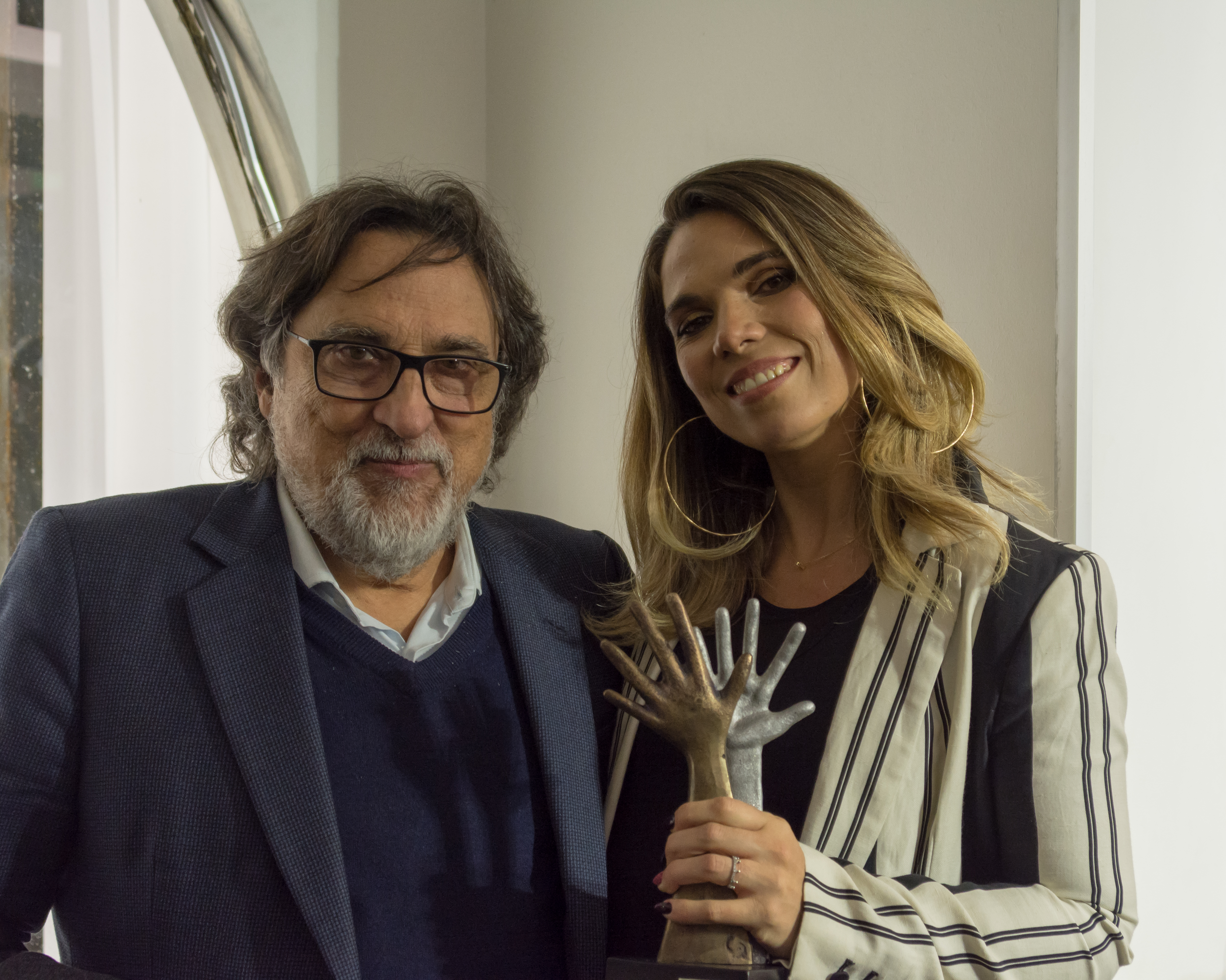 Silvio Caiozzi y Valentina Caiozzi, Premios Pulsar 2019, Teatro Teletón, Santiago, Región Metropolitana, Chile.